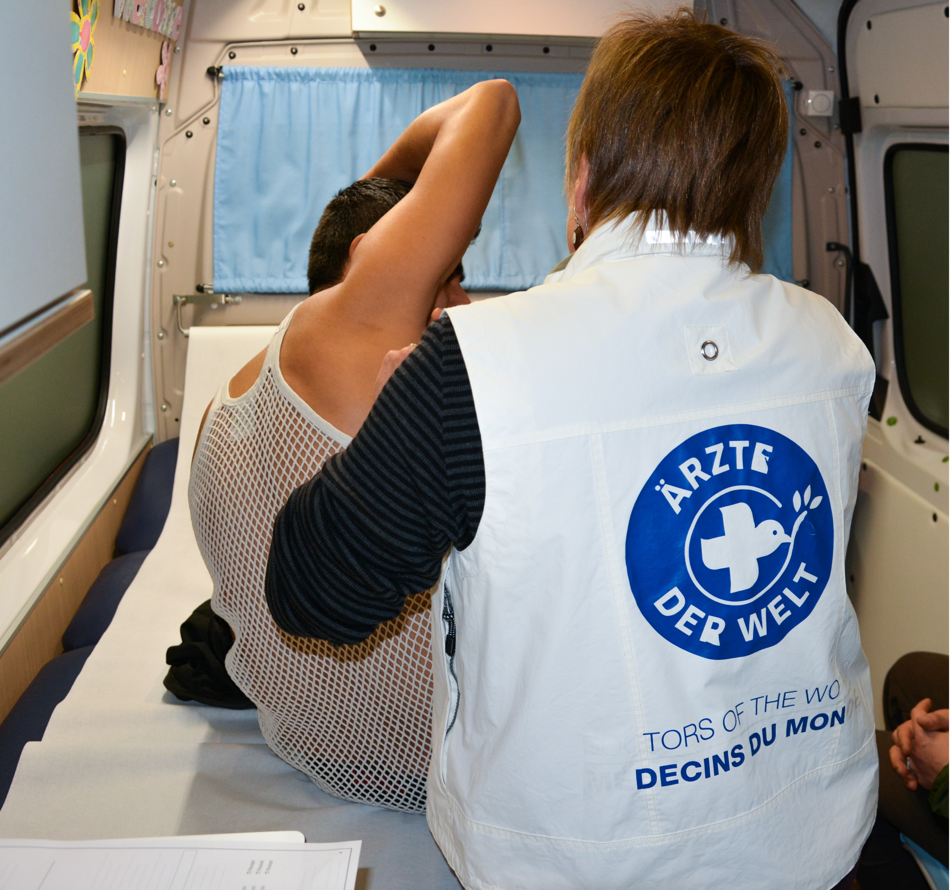 Ehrenamtliche Ärtzin untersucht Nichtversicherten im Ärzte der Welt-Behandlungsbus (2017) während des Kälteschutzeinsatzes in München